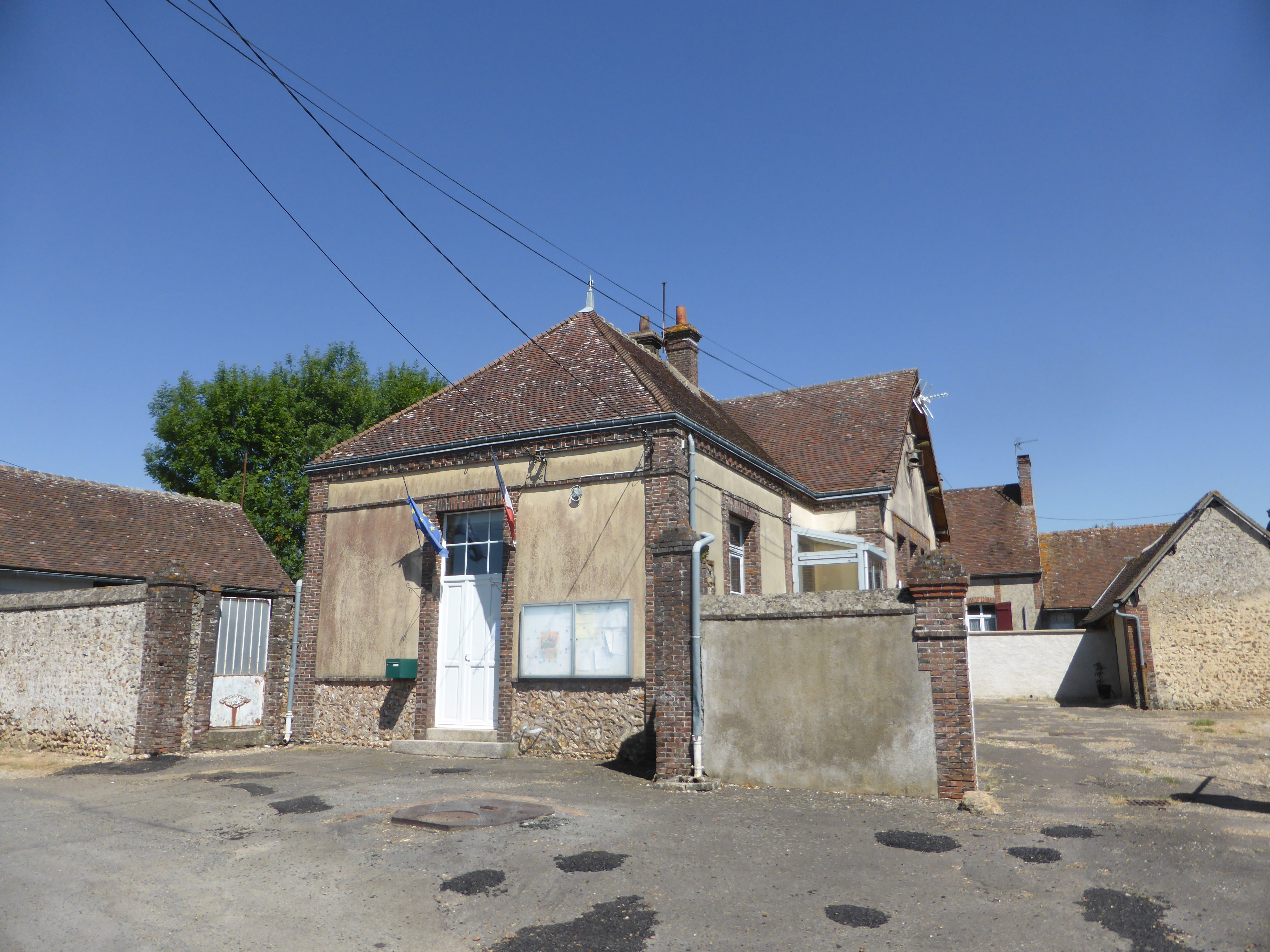 Mairie d'Ardelles, en Eure-et-Loir.